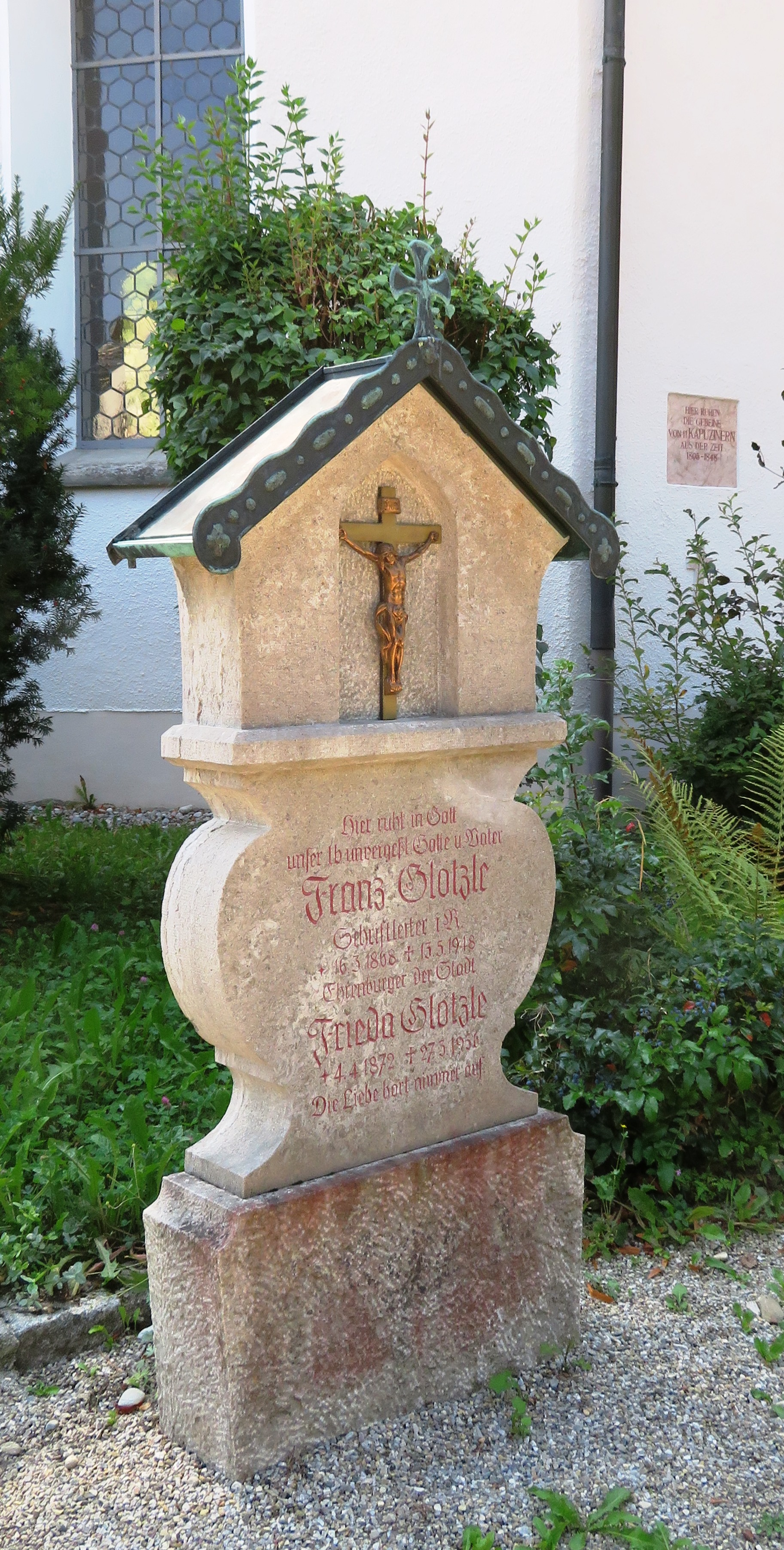 Gottesackerkapelle St. Georg in Immenstadt im Allgäu